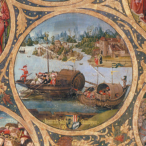 Heinrich II. auf dem 2. Kreuzzug. Ausschnitt aus dem Babenberger Stammbaum, Stift Klosterneuburg.